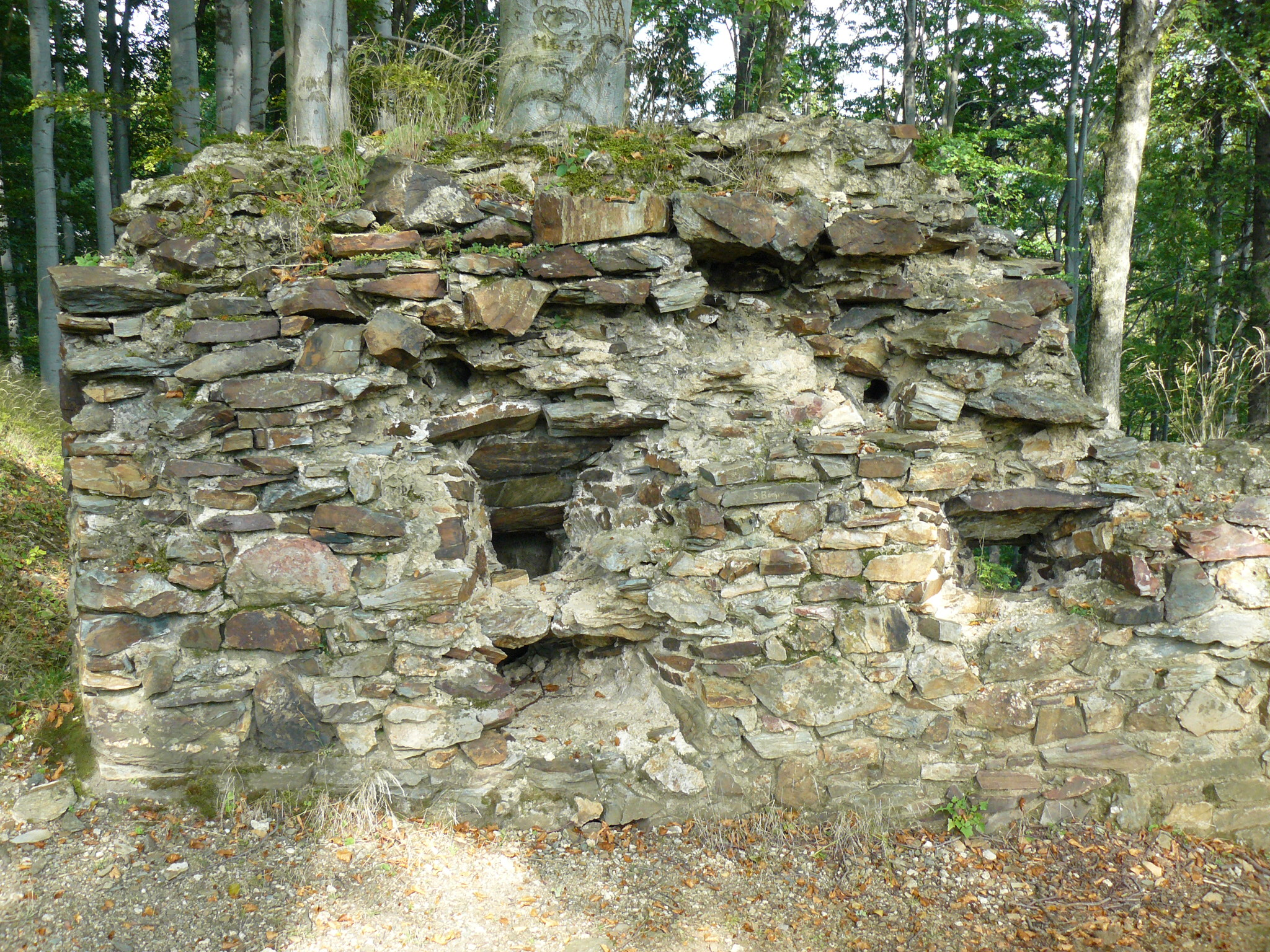 Zřícenina hradu Edelštejn na Zámeckém vrhu u Zlatých Hor